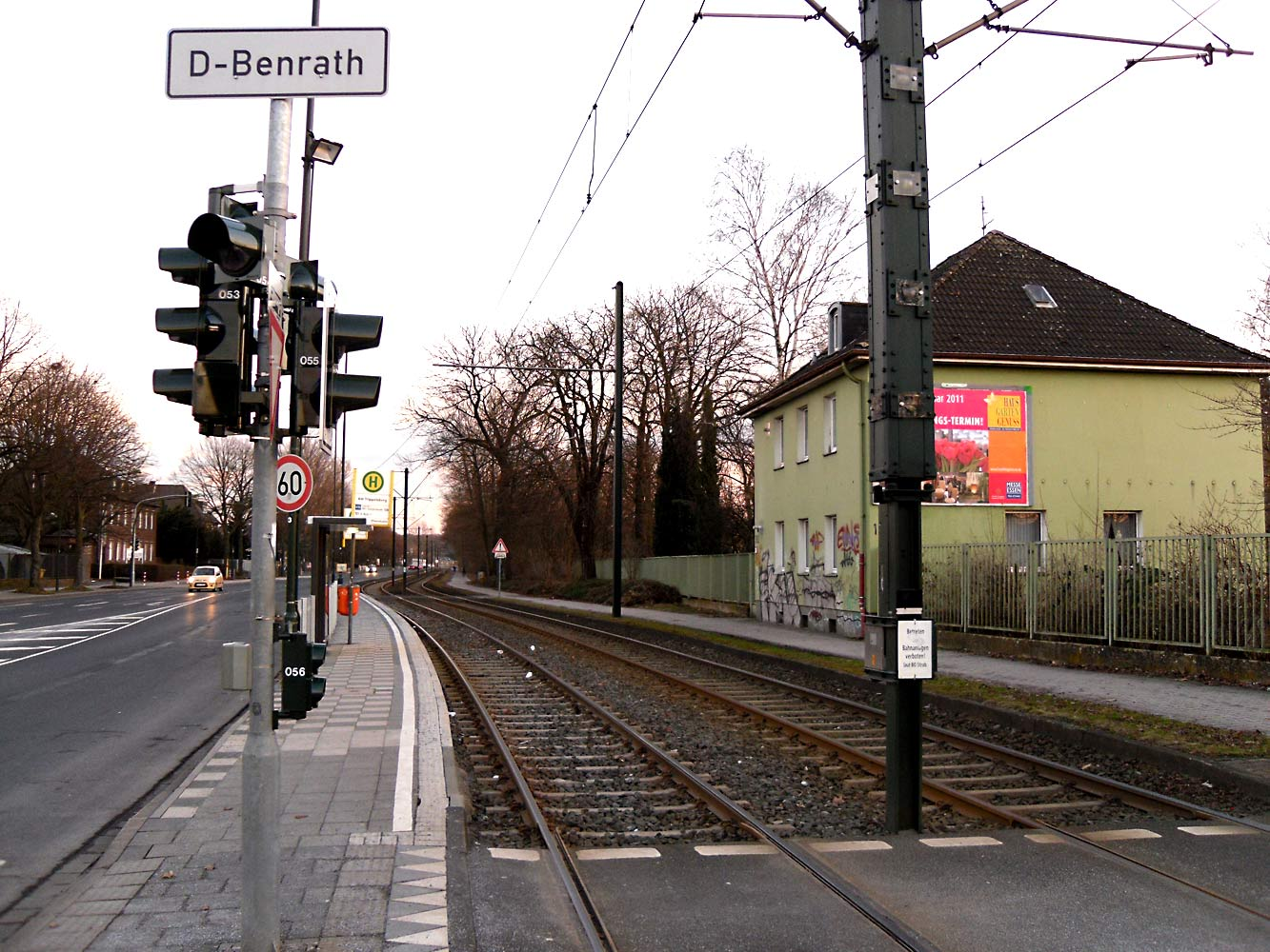 Tram in Benrath